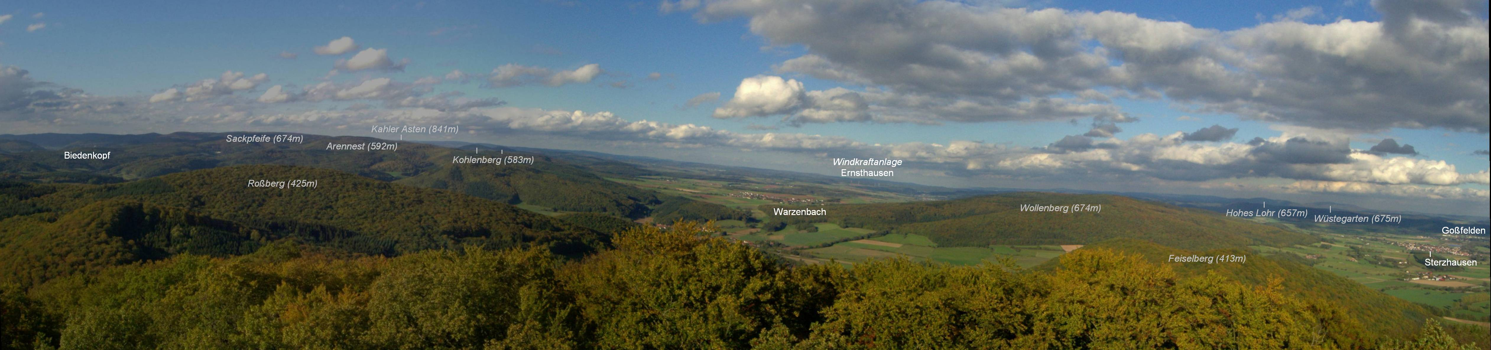 Blick vom 498 m hohen Rimberg im Gladenbacher Bergland auf das Rothaargebirge mit der Sackpfeife (674 m) und seinen Vorhöhen Arennest (592 m), Kohlenberg (583 m) und Wollenberg (474 m) im Norden. Ganz rechts im Hintergrund der 35 km entfernte Kellerwald mit dem Hohen Lohr (657 m) und dem Wüstegarten (675 m).